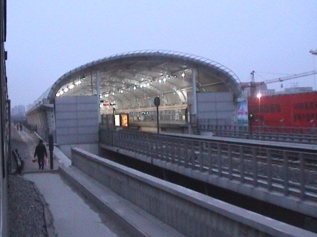 Animation